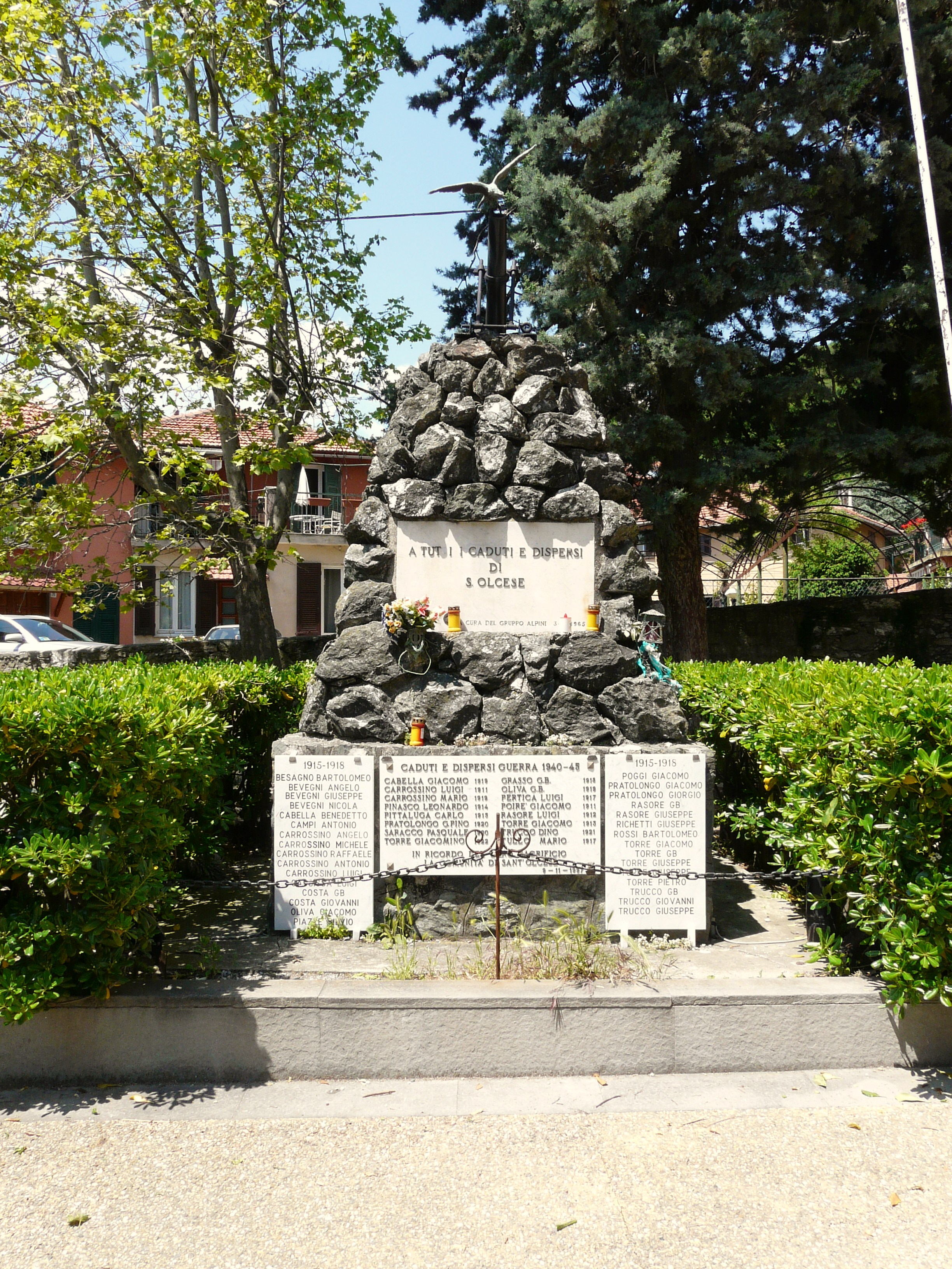 Monumento ai caduti di Sant'Olcese, Liguria, Italia